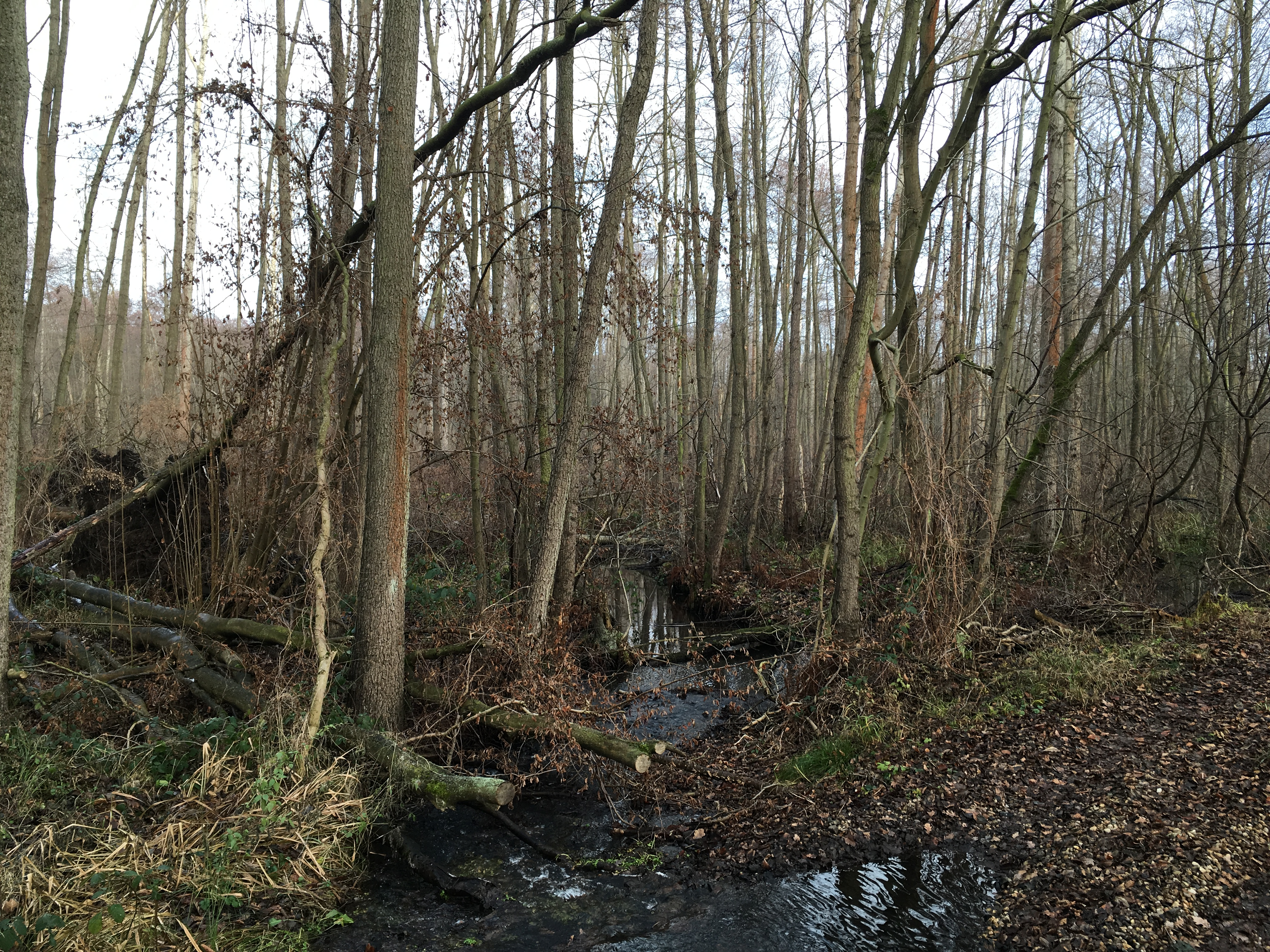 Das Naturschutzgebiet Zarth ist ein rund 262 Hektar großes Gebiet in Treuenbrietzen, Brandenburg.